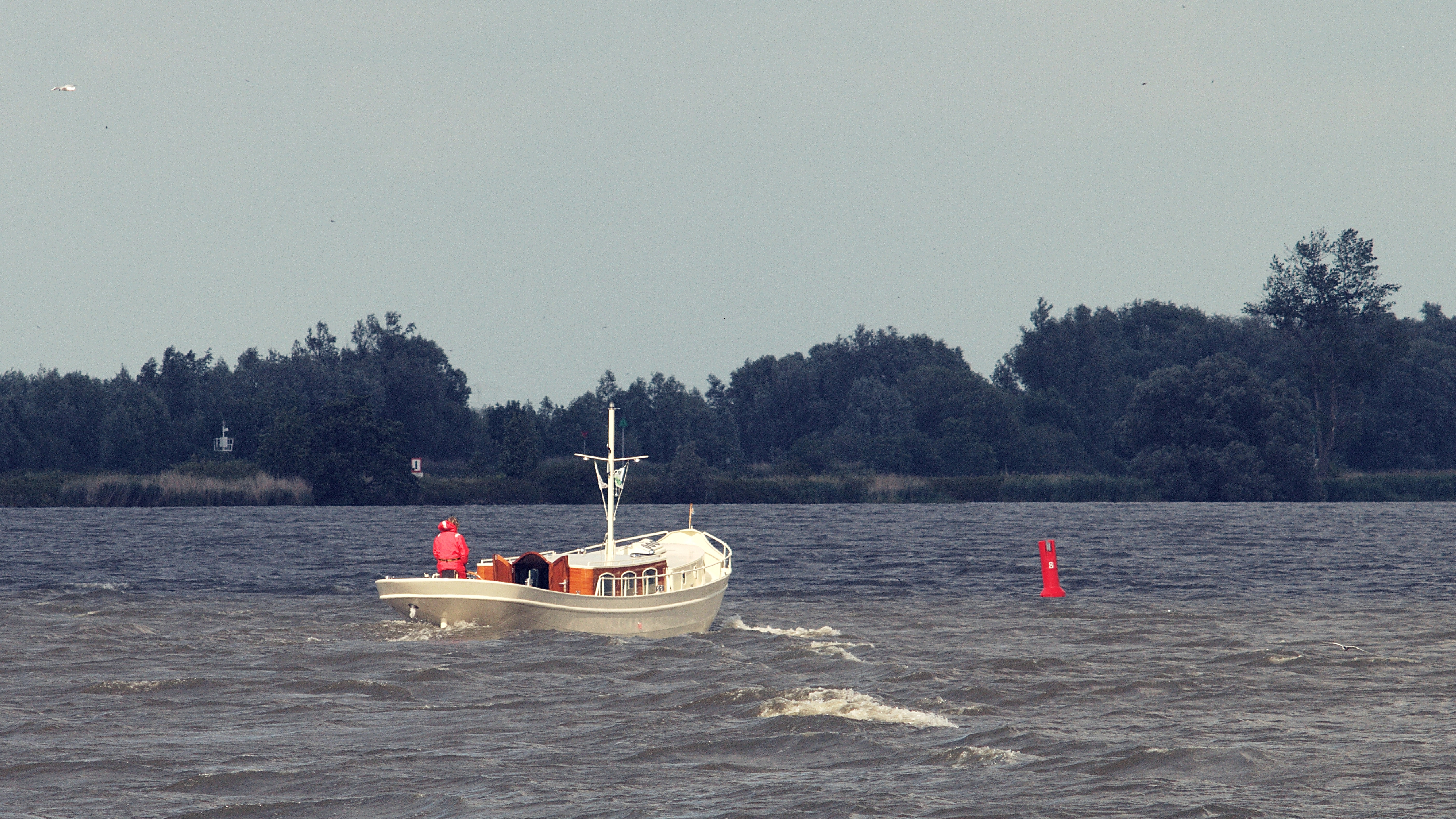 Vossemeer